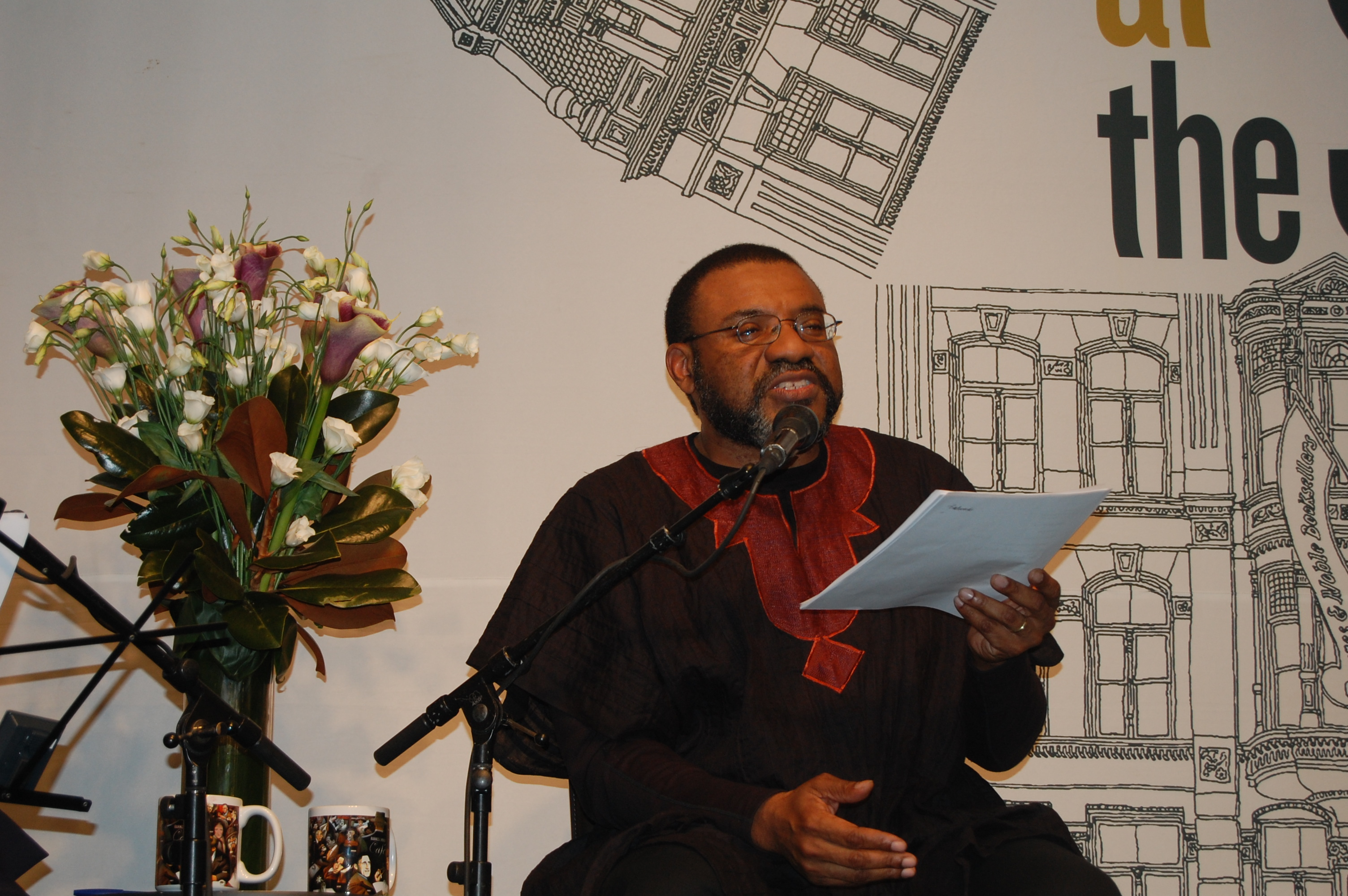 kwame dawes